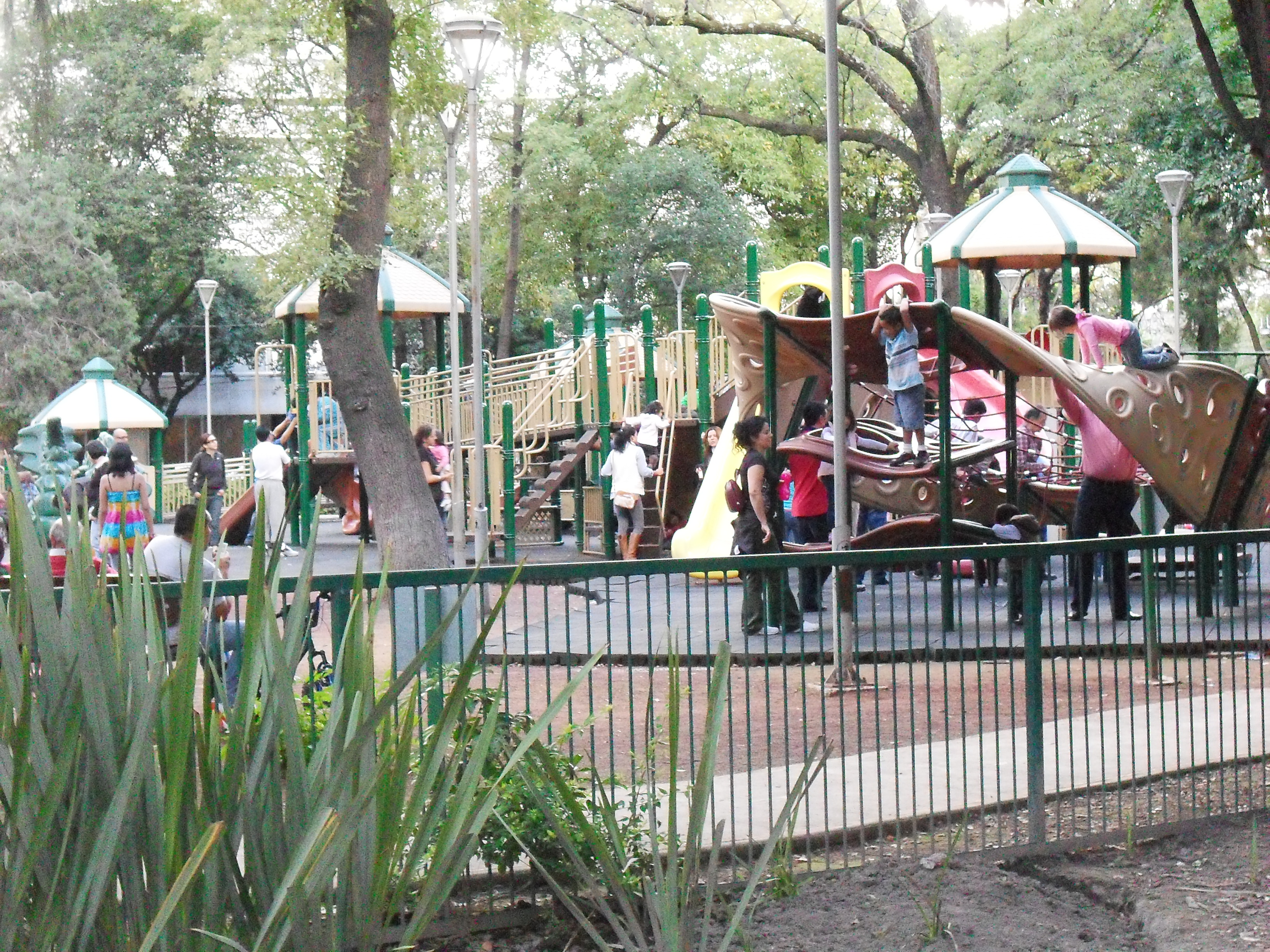 Área de juegos recientemente re-modelada en el parque